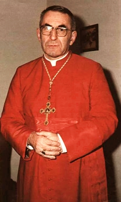 Albino Luciani da patriarca di Venezia